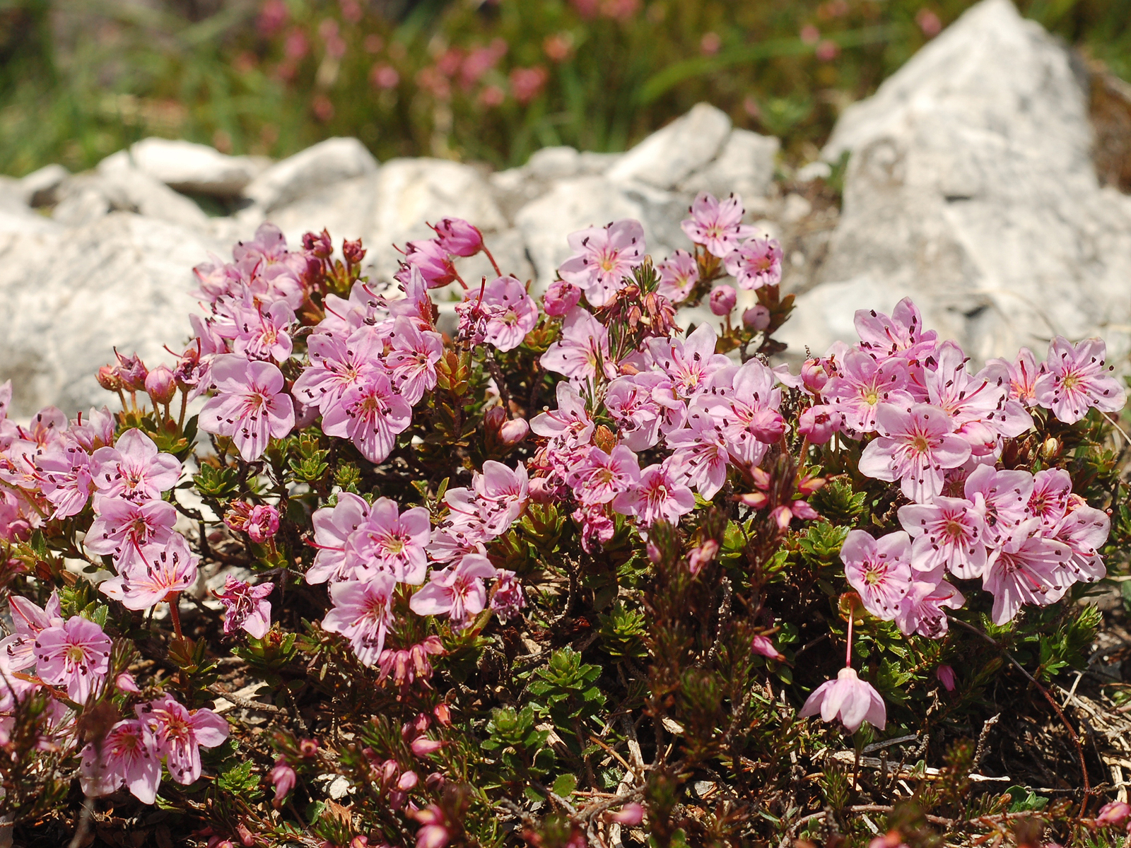 Bildbeschreibung: Rhodothamnus chamaecistus, Zwergalpenrose Quelle: Eigenes Bild Fotograf/Zeichner: Strauchdieb Datum: 15.06.2006